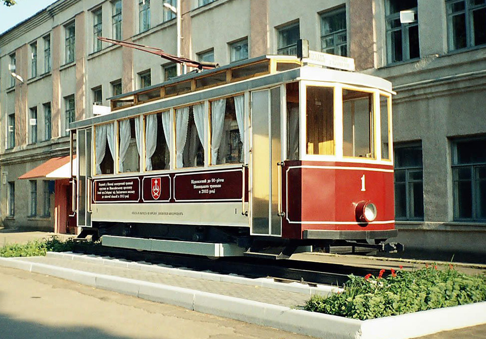 Макет двухосного трамвая MAN в Виннице